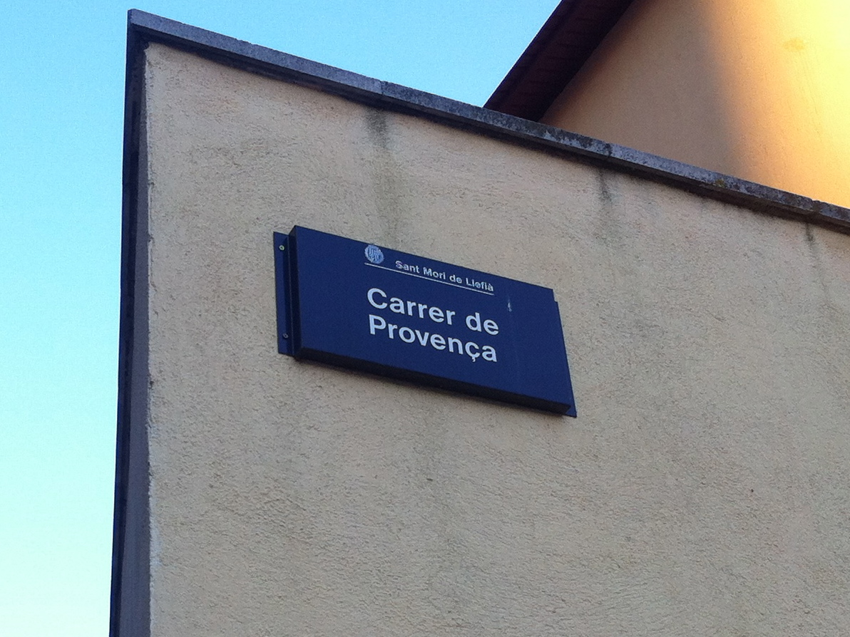 Placa del carrer de Provença, Sant Mori de Llefià, Badalona